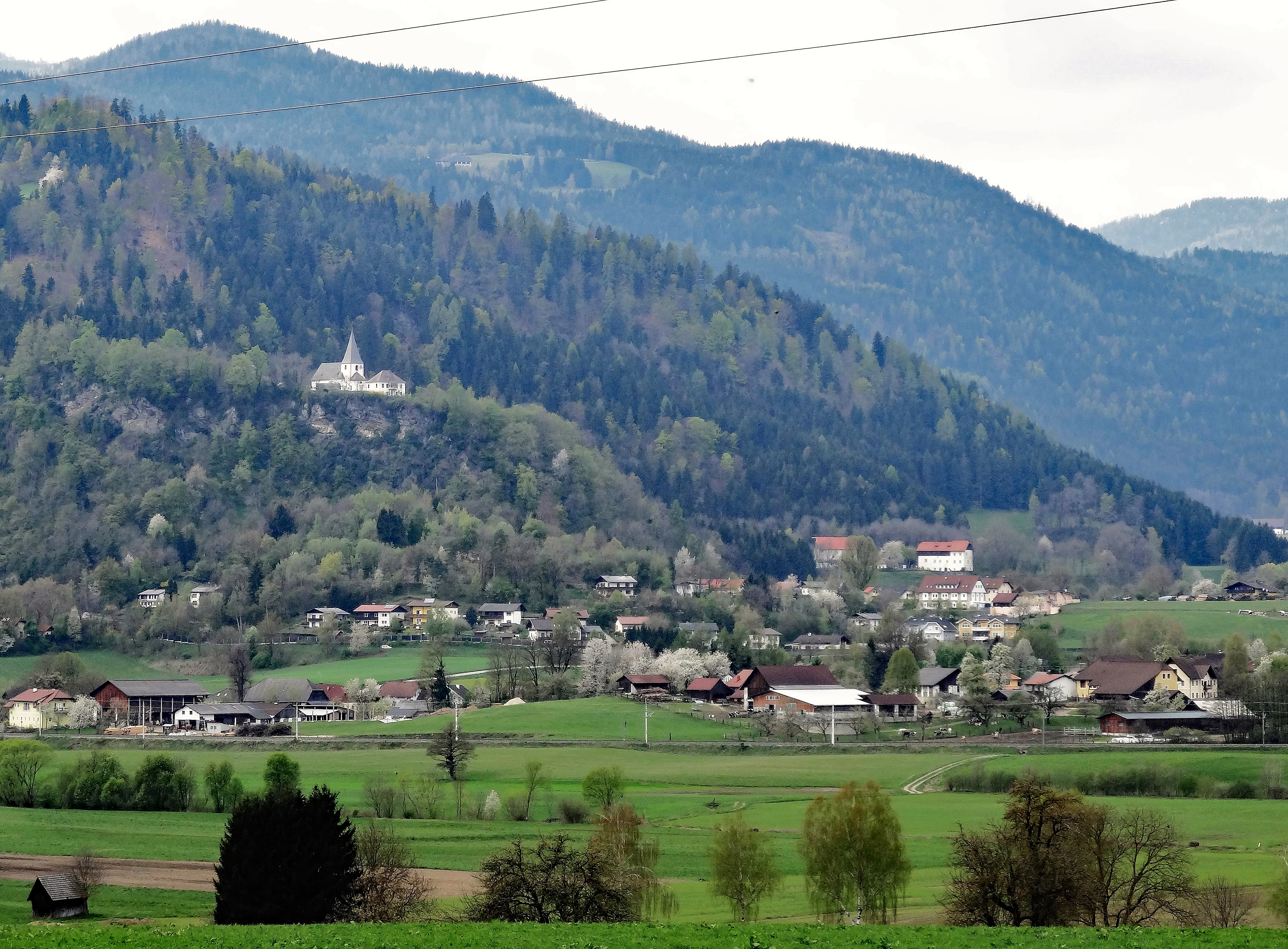 Das Dorf Tiffen (Steindorf)